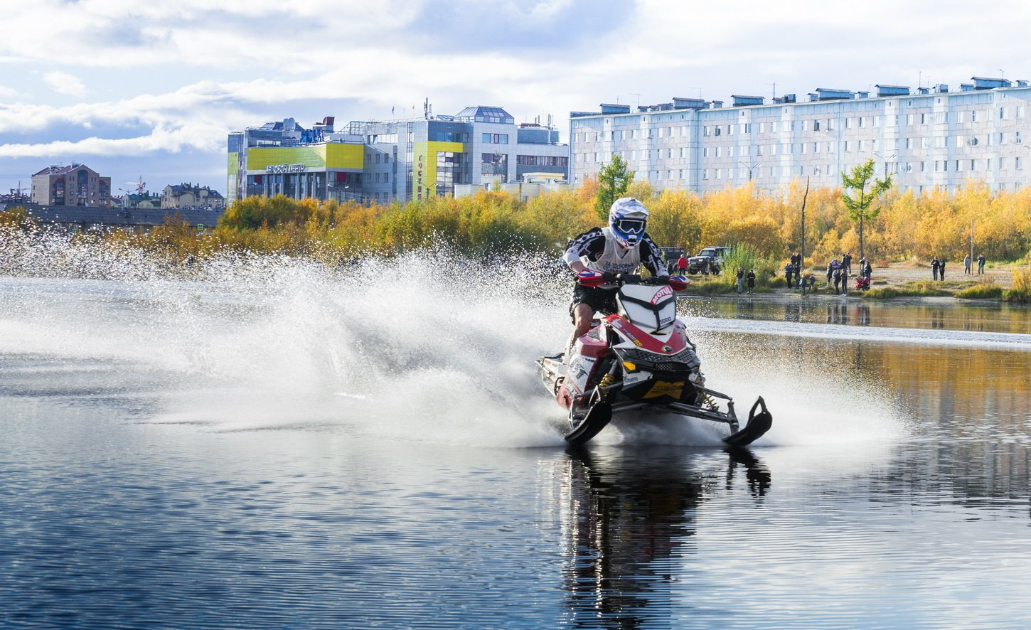 Гонки на снегоходах по воде (озеро Молодежное, г. Новый Уренгой).